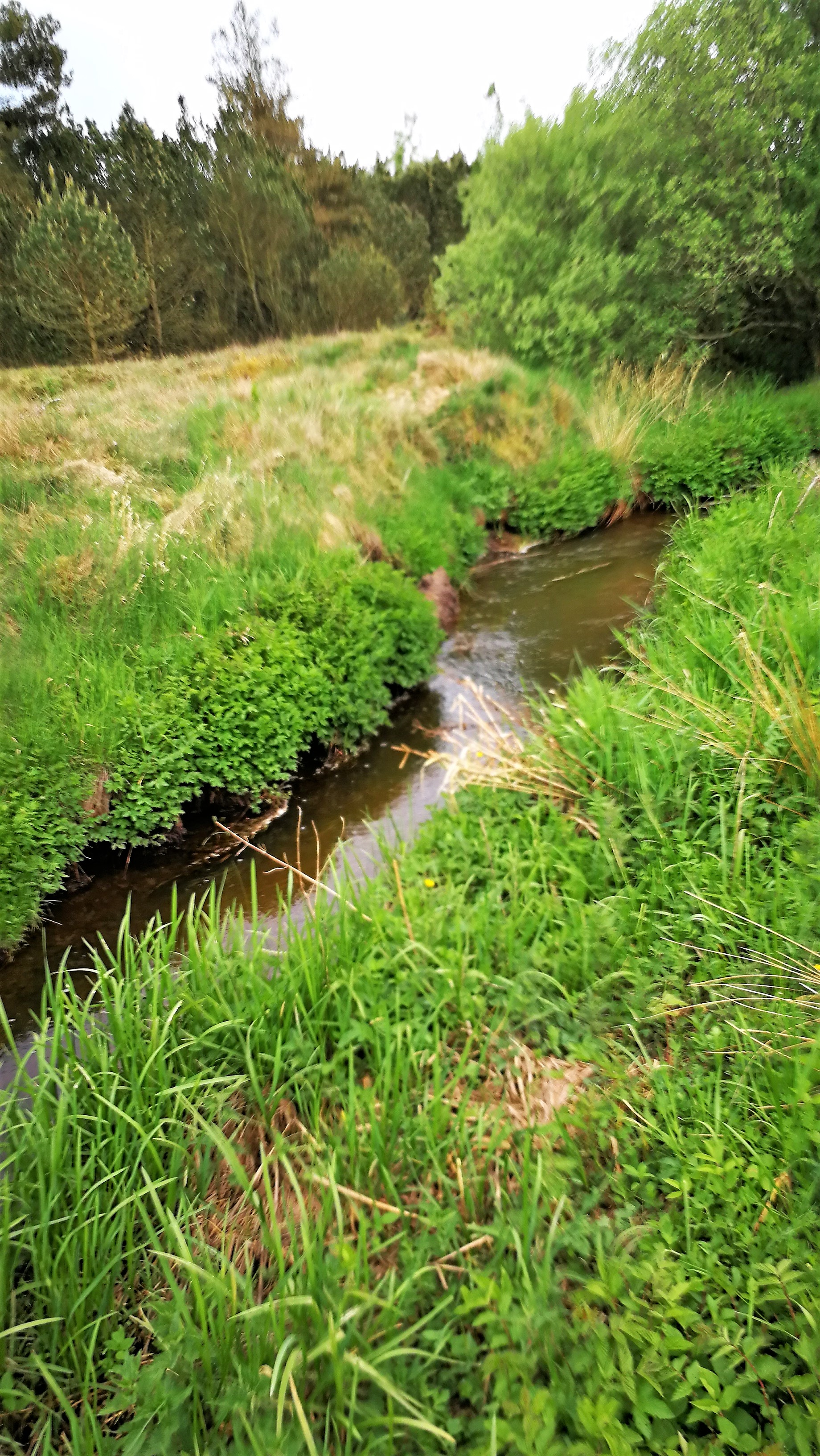 Bording Å